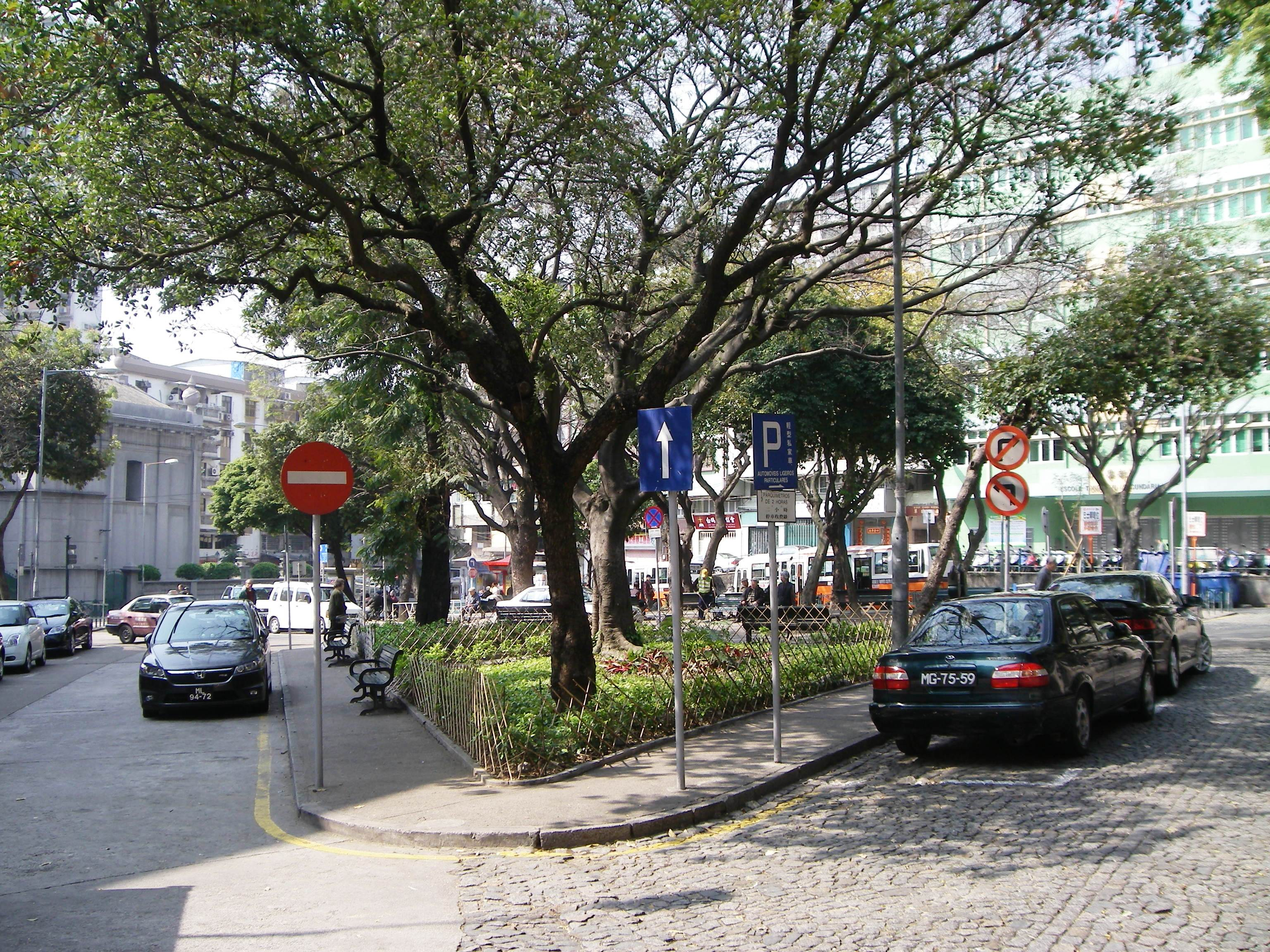 Praca Camoes, Macau